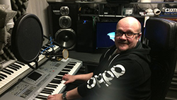 Juhani Hakopuro elementissään